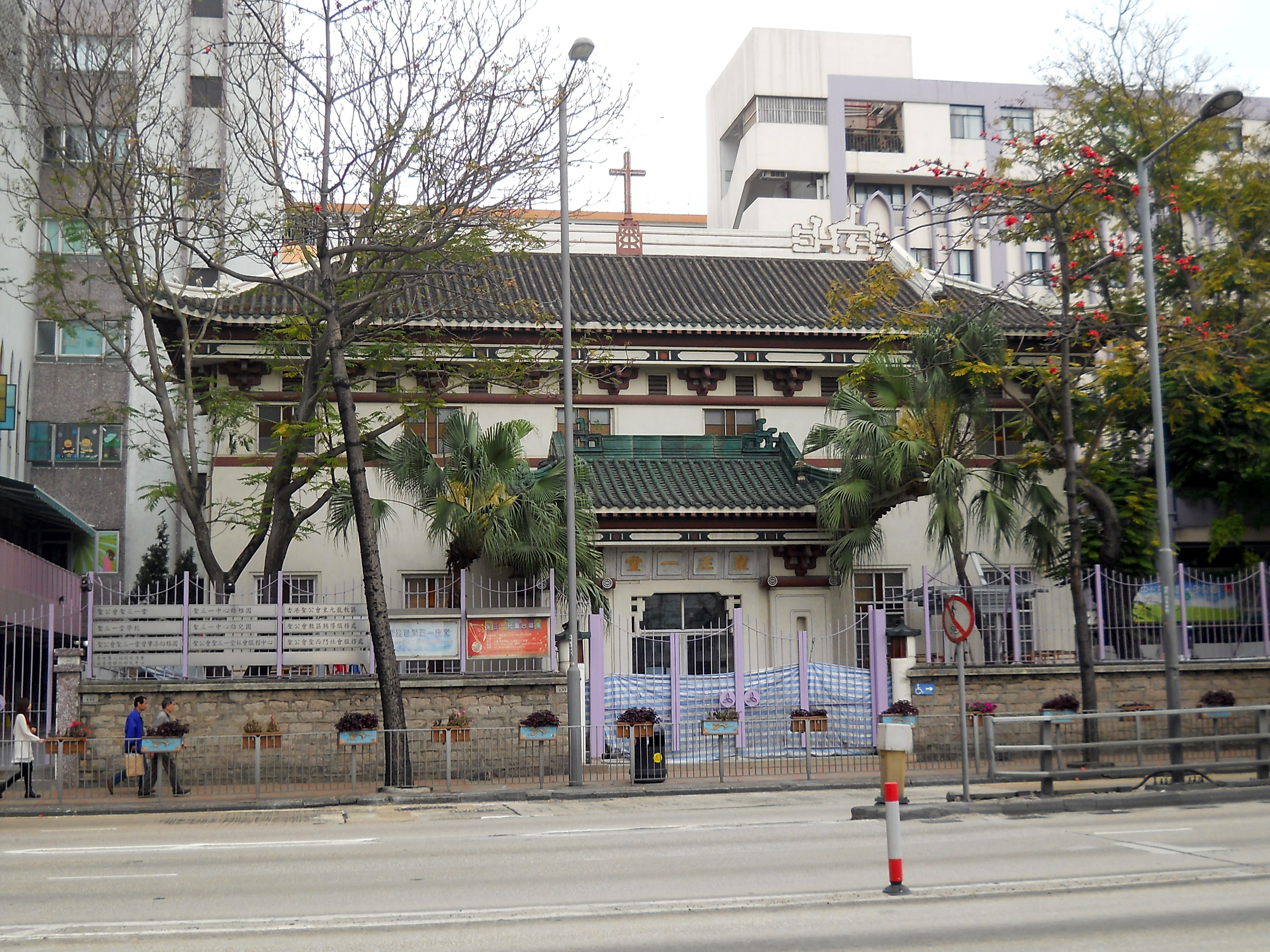 中文（香港）: 聖公會聖三一堂